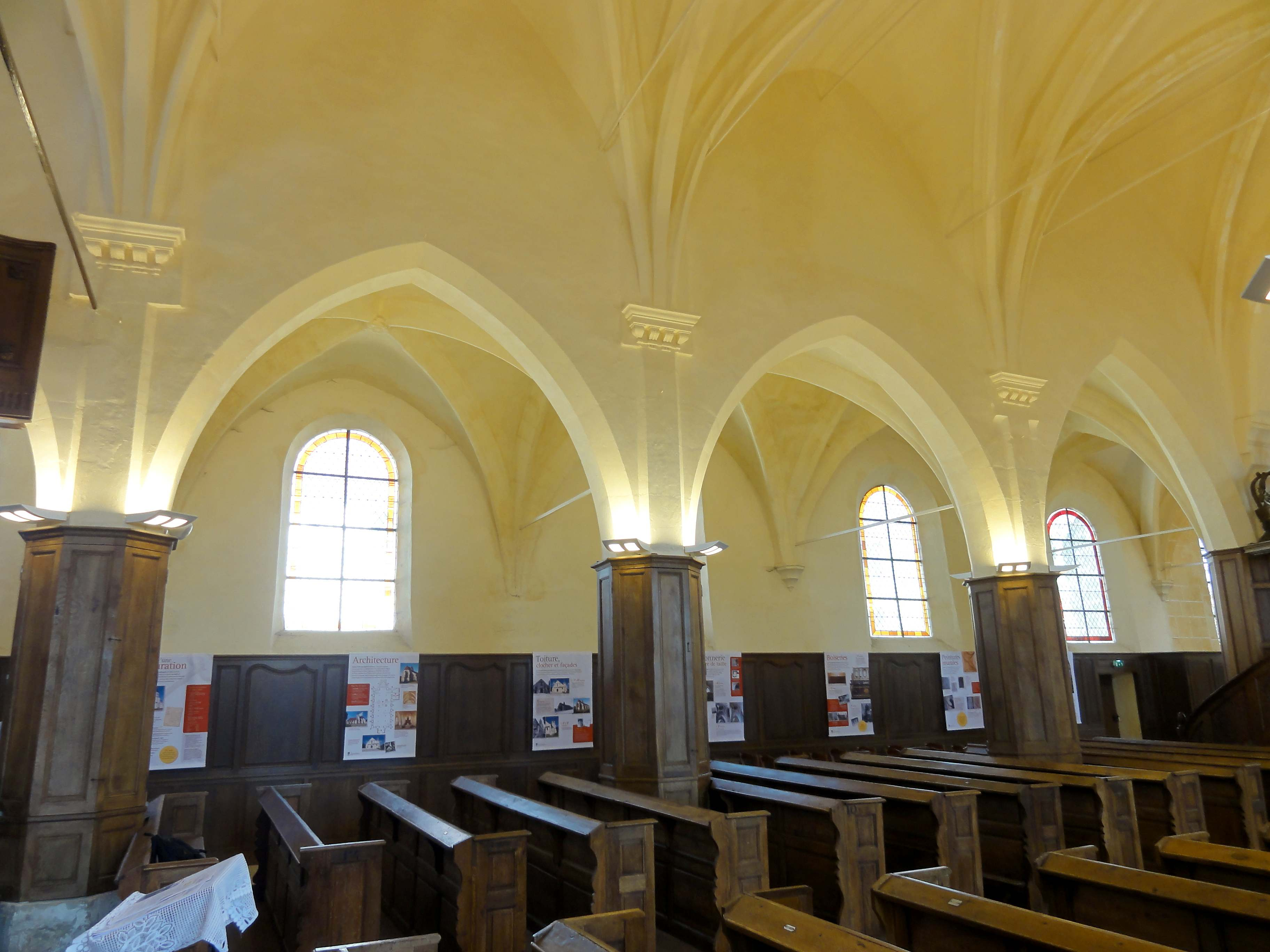 Interieur de l'église (voir titre).